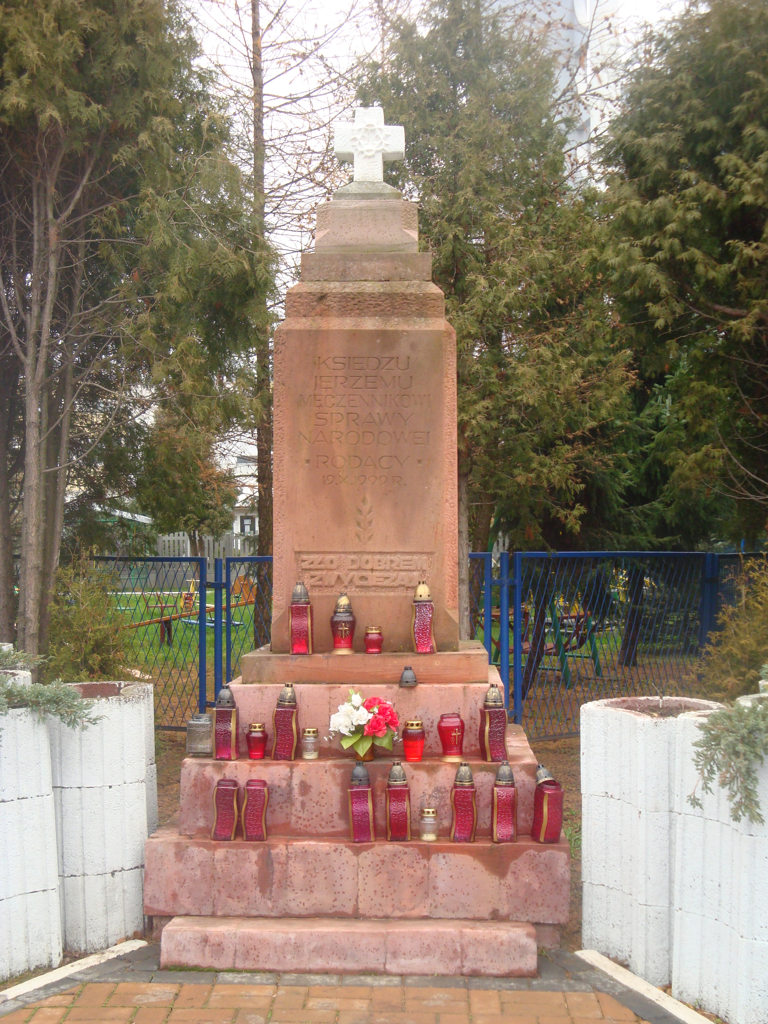 Kościół Matki Bożej Nieustającej Pomocy w Tarnobrzegu-Serbinowie